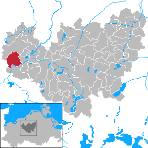 Baumgarten in Mecklenburg-Vorpommern - District Güstrow